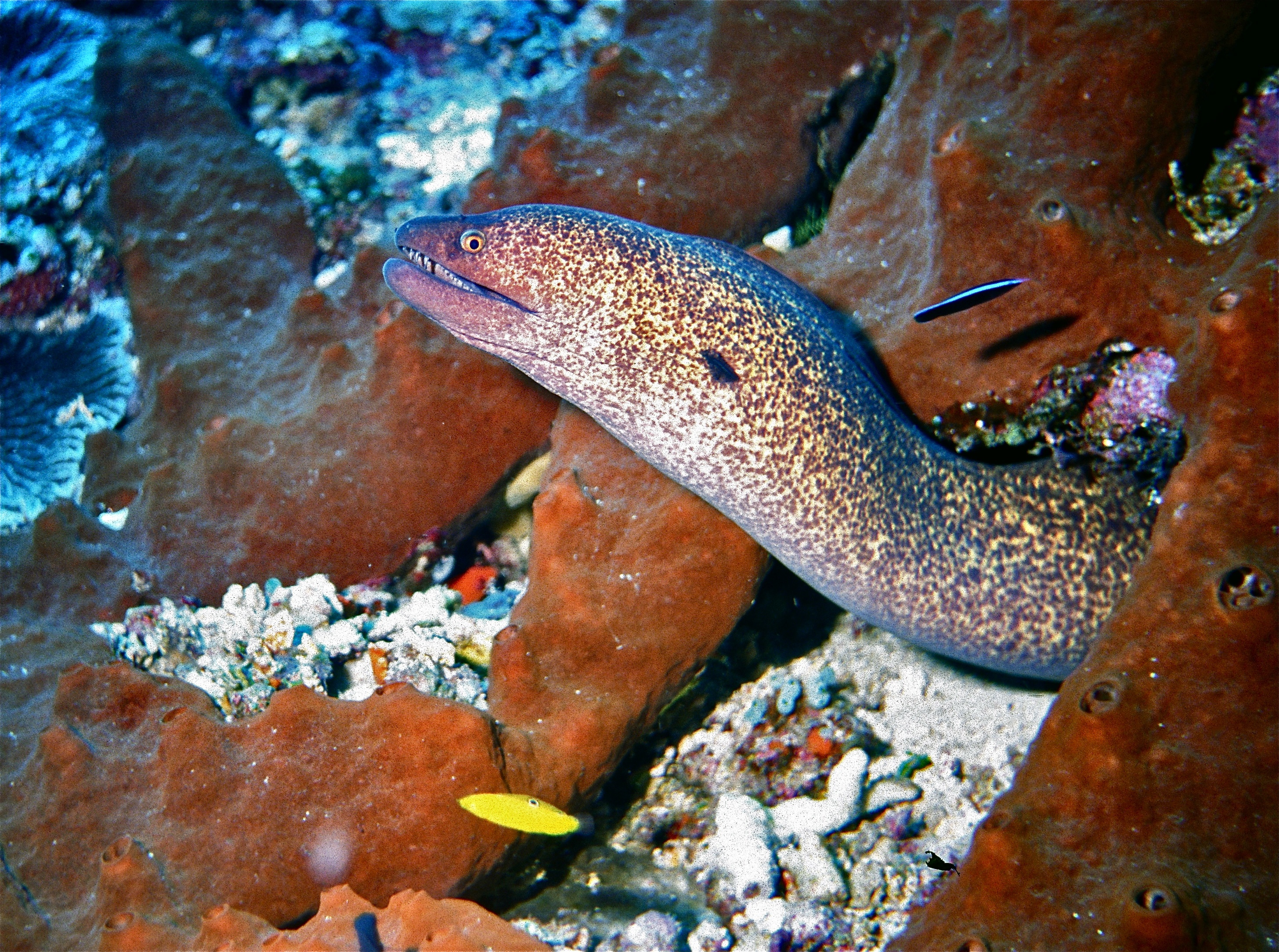 Bunaken, Sulawesi, INDONESIA